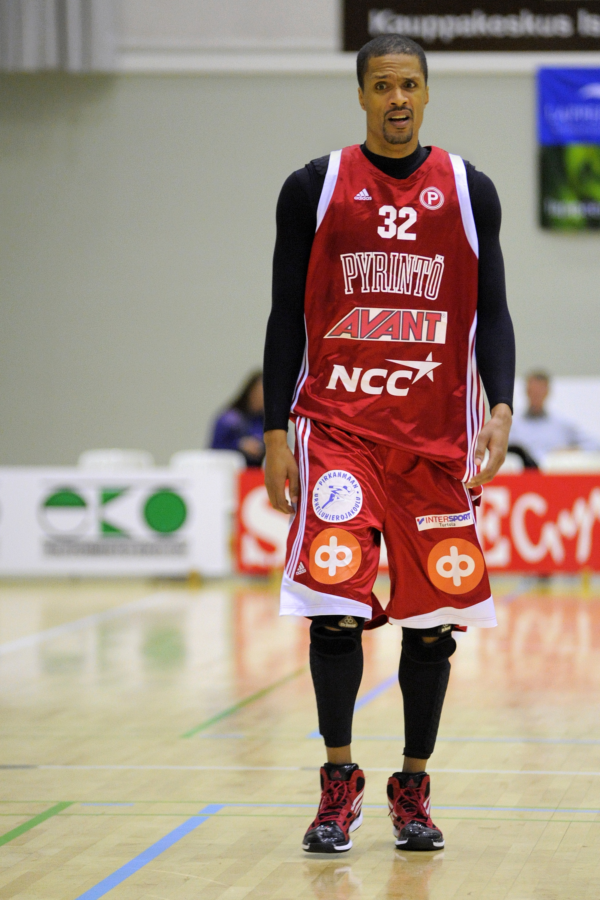 Koripalloilija Damon Williams 30.10.2011 ottelussa Lappeenrannan NMKY - Tampereen Pyrintö.